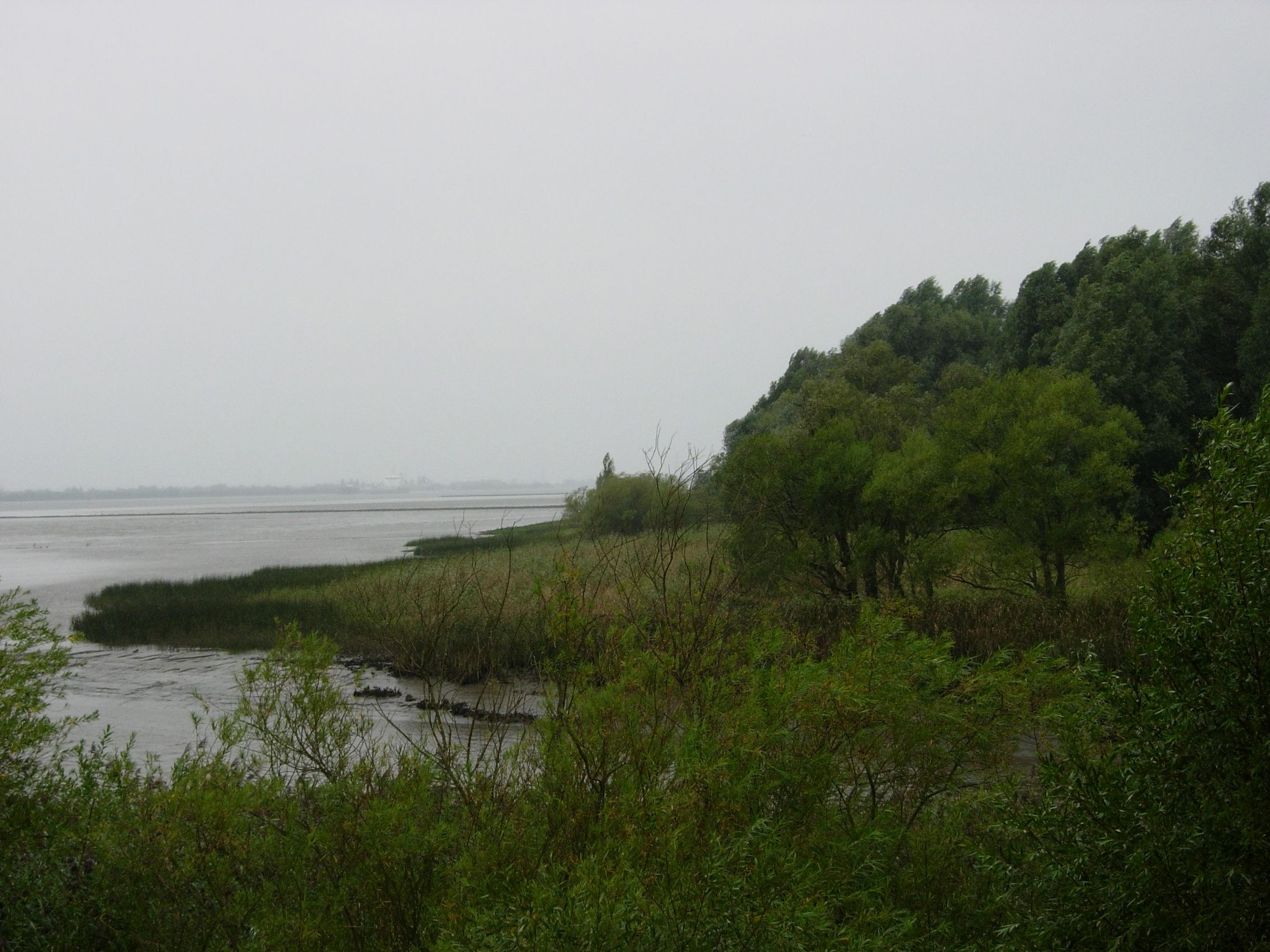 Einmündung der Wedeler Au in die Unterelbe